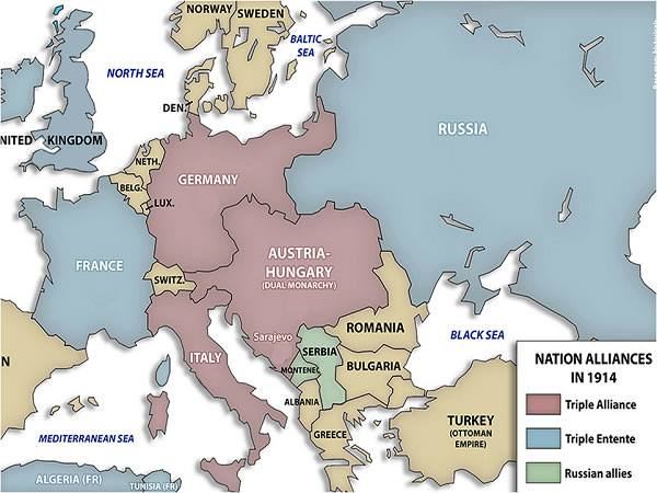 සිංහල: පළමු ලෝක යුද්ධයට පෙර යුරෝපය